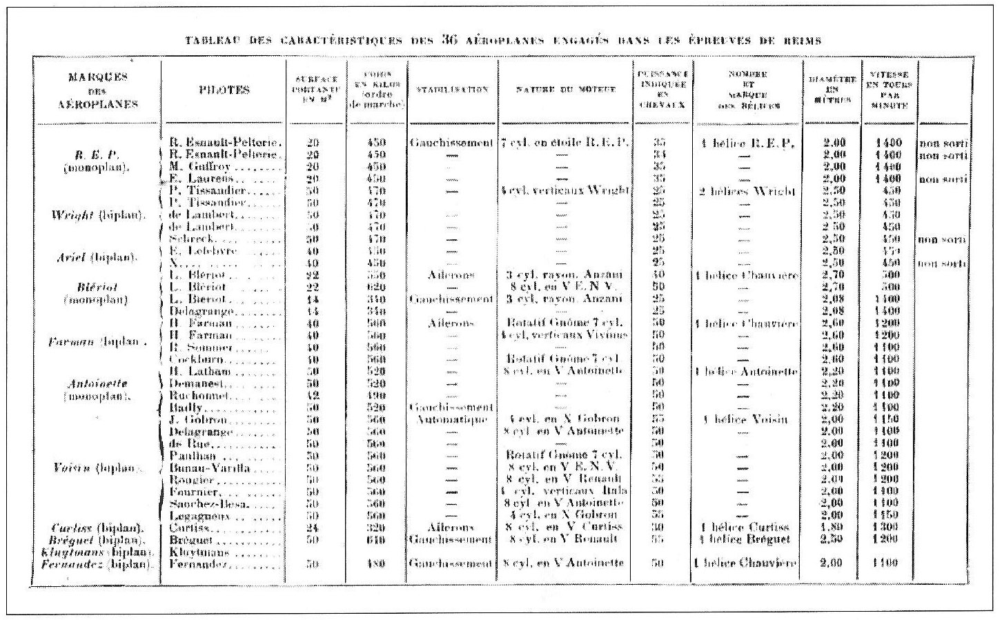 Grande semaine de l'aviation, les avions, les concurents in La Revue Aérienne.